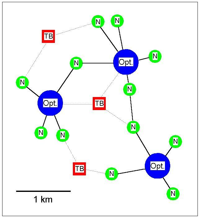 Schematische Darstellung eines Metapopulationsmodells (Tierökologie).